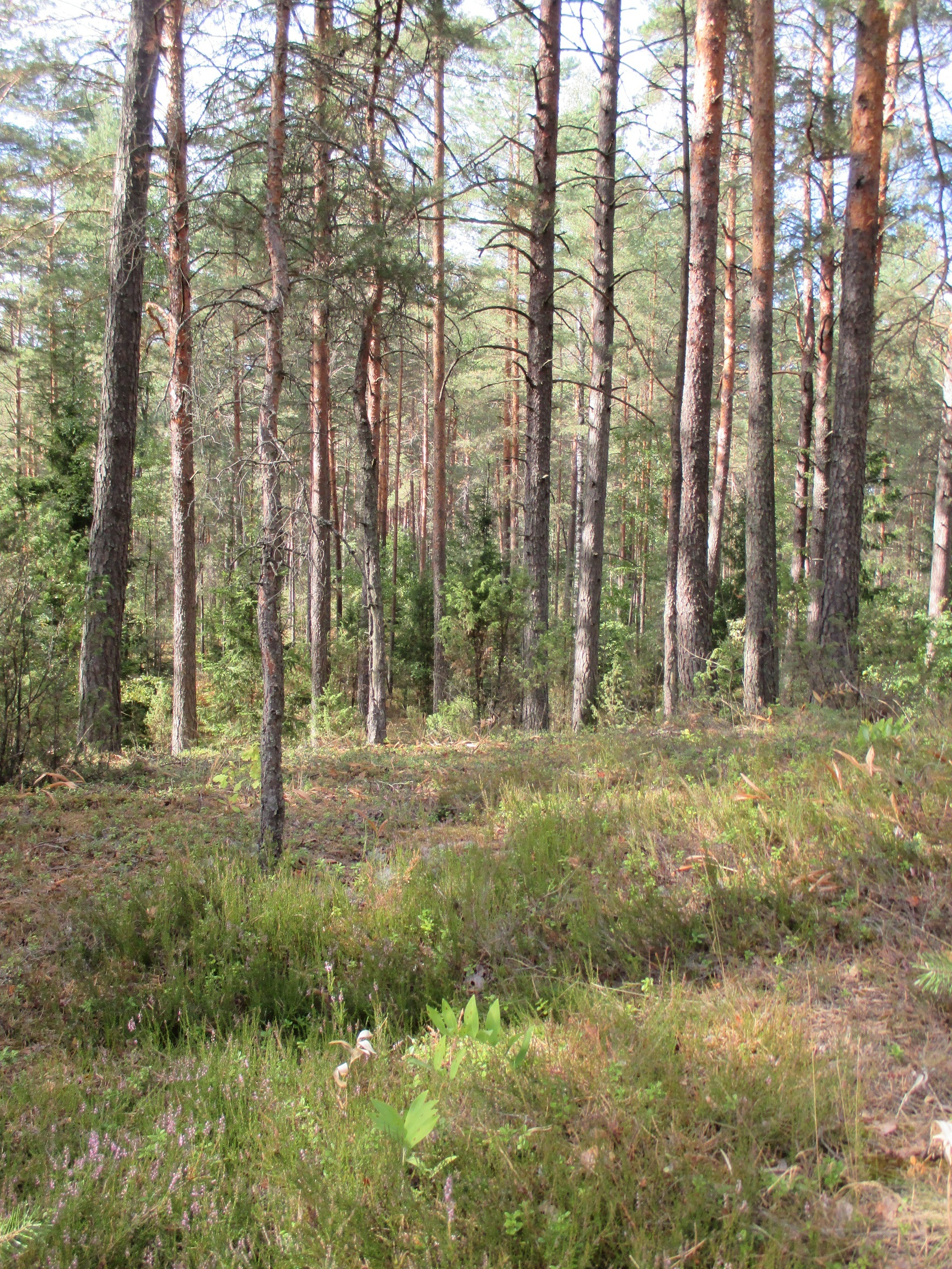 Ліпічанская пушча. Верасовы бор на пясчанай грыве (Дзятлаўскі раён)